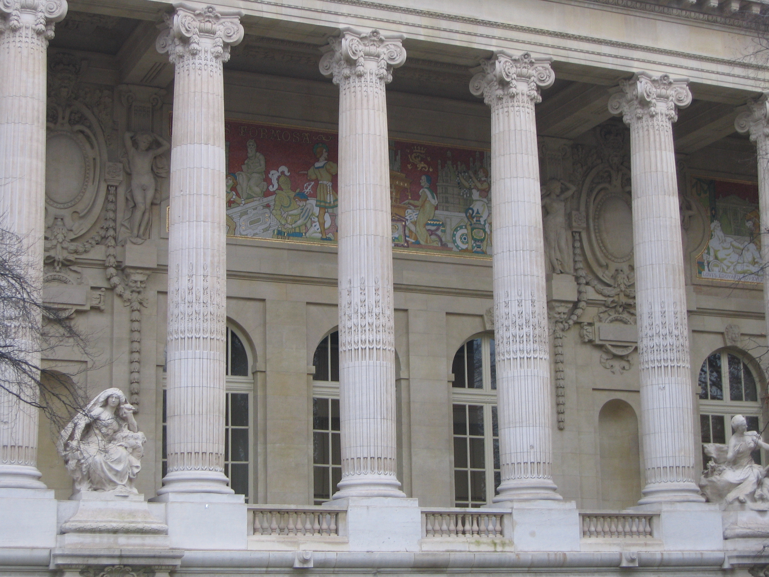 L'extérieur du grand Palais.